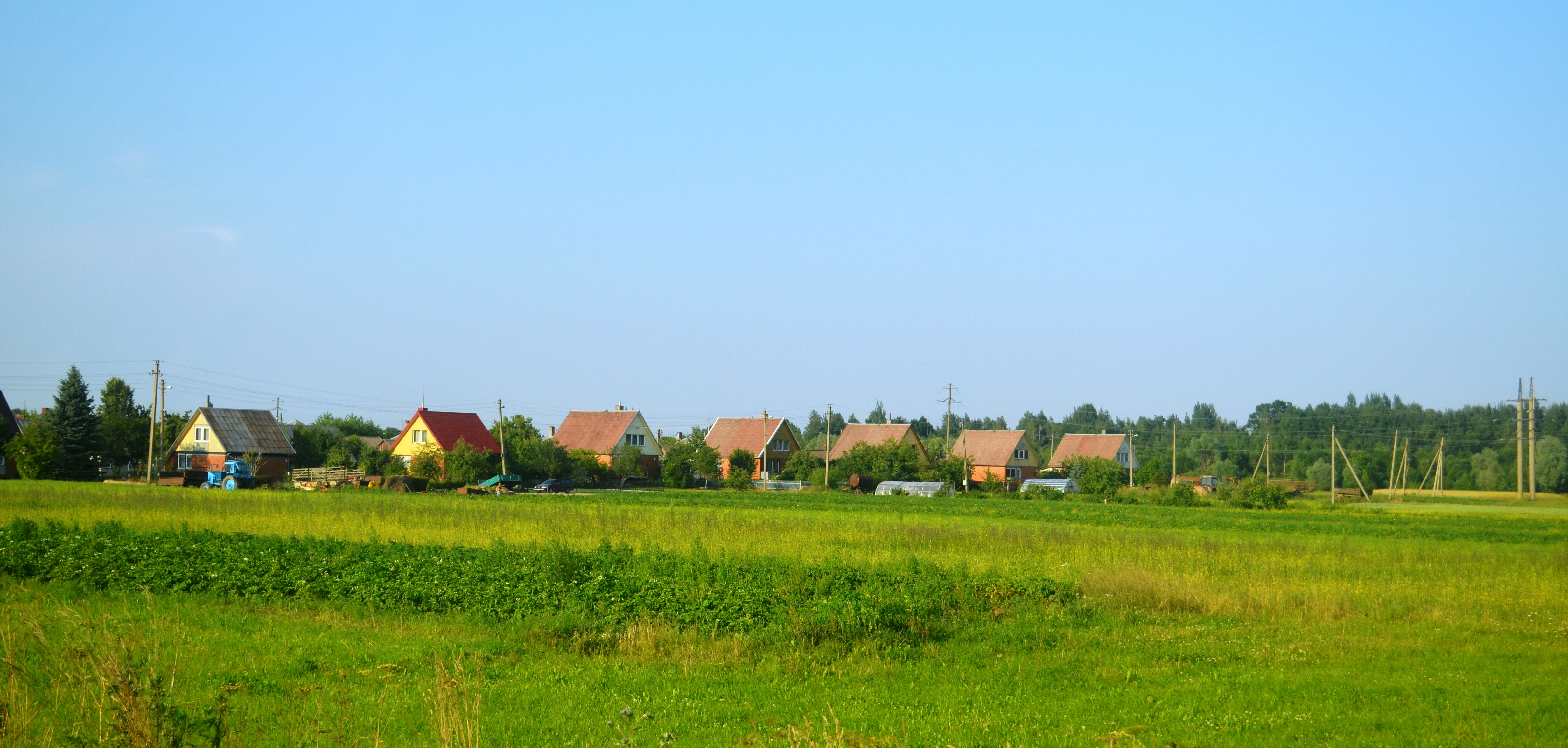 Upninkai, Jonavos raj.